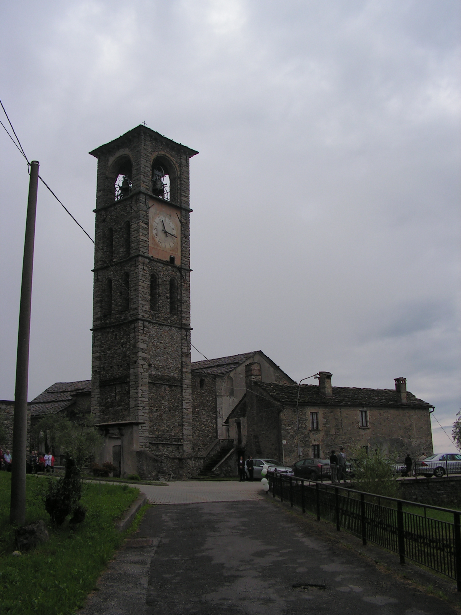 Peglio (CO) - Chiesa dei Santi Eusebio e Vittore